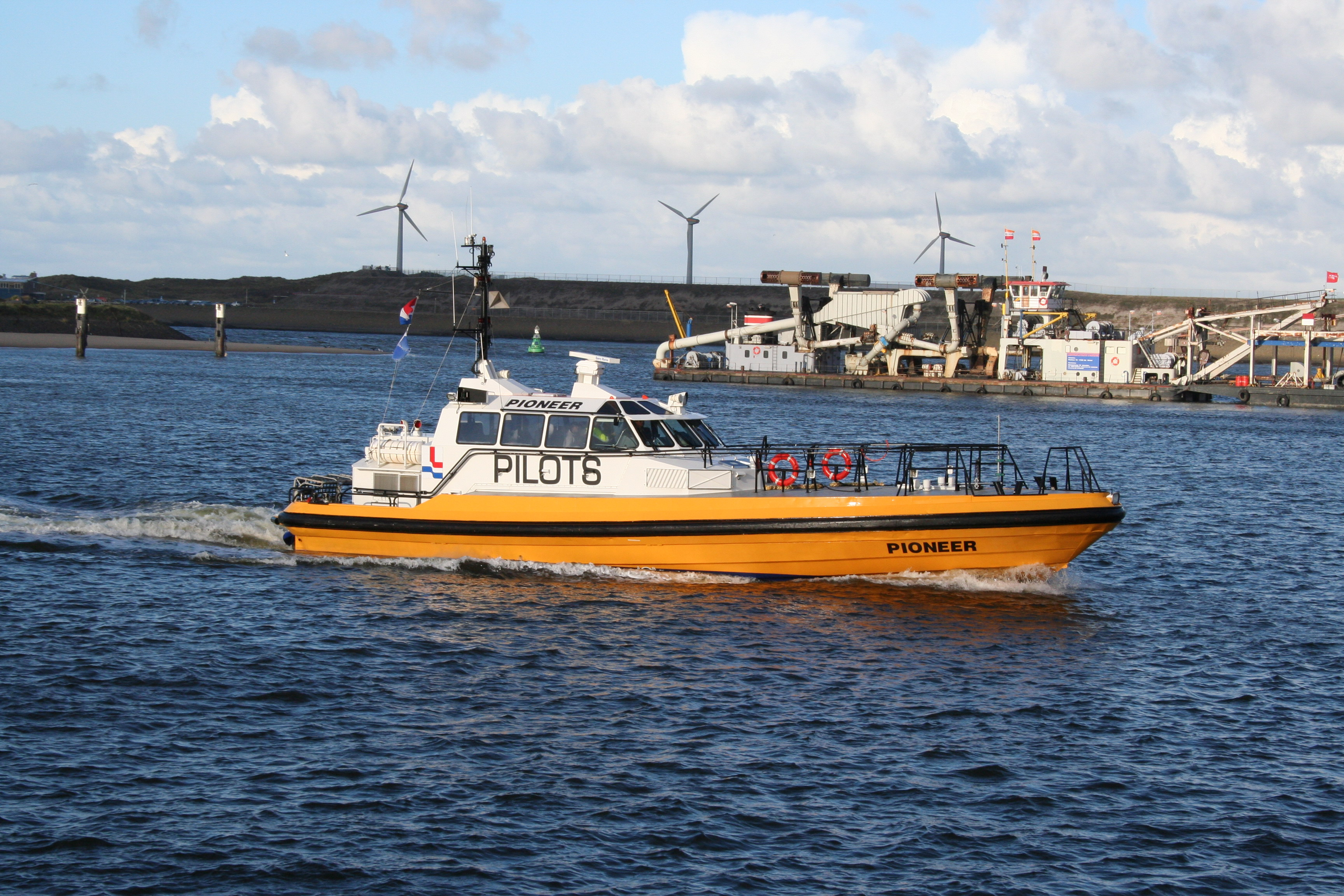 Loodsboot IJmuiden Pilots boat